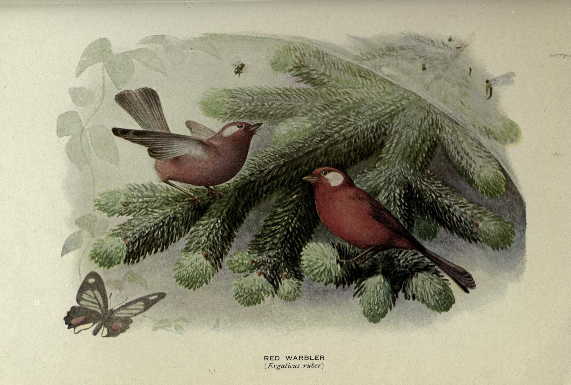 UJ ^ -J-S m . .' ?* -v Q Wl o